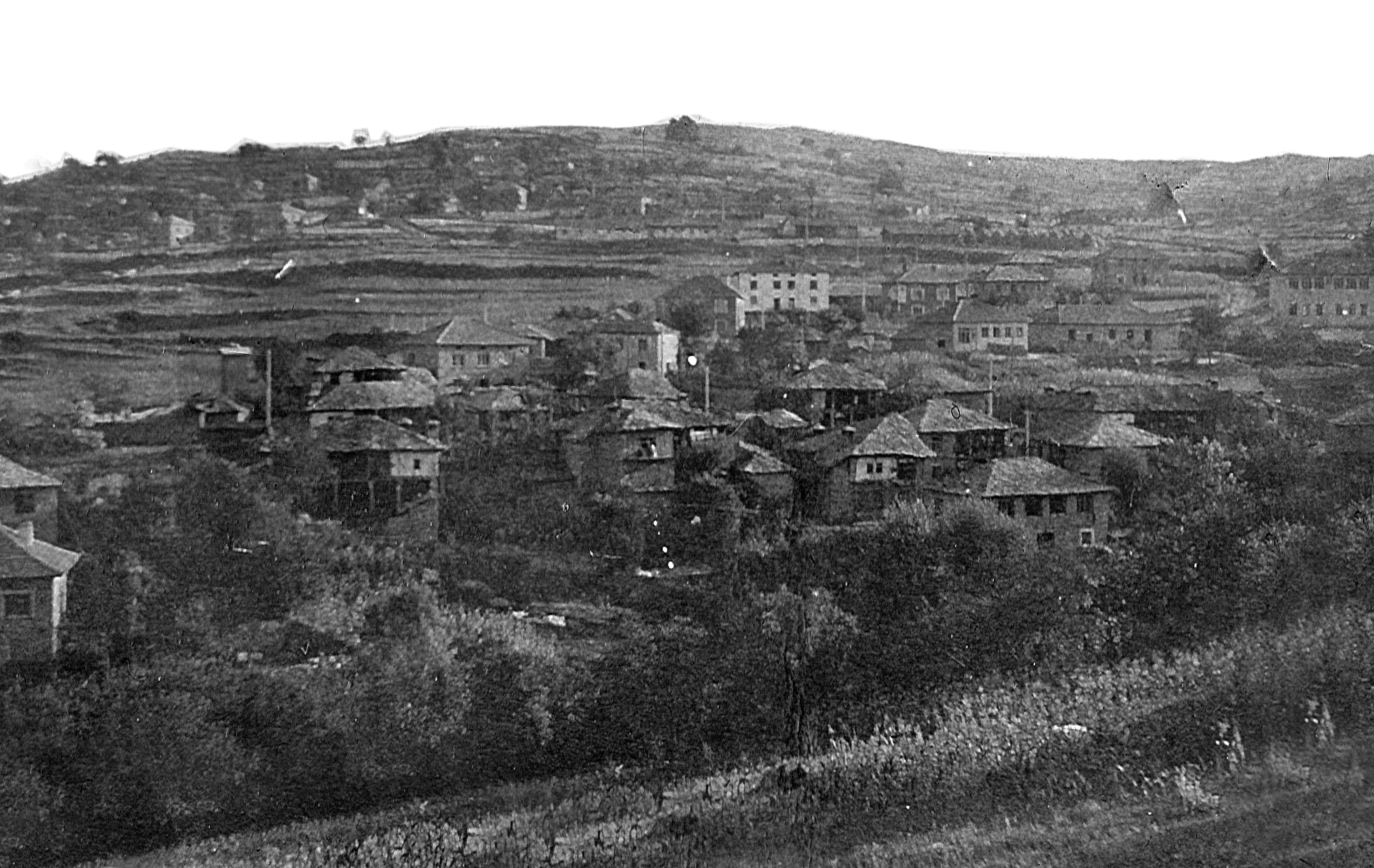 Поглед към Долна Махала на с. Туховища през първата половина на XX век.